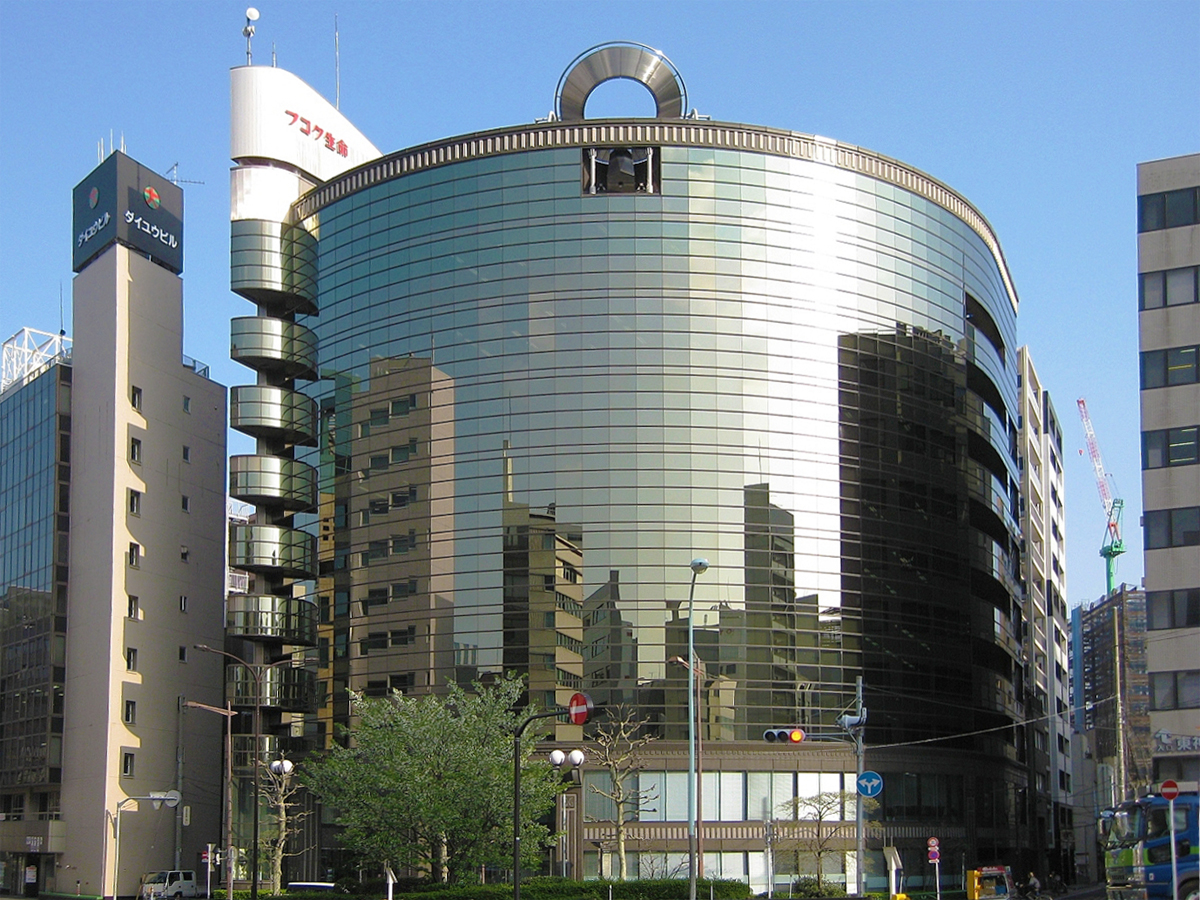 東神田フコク生命ビル （東京都千代田区）